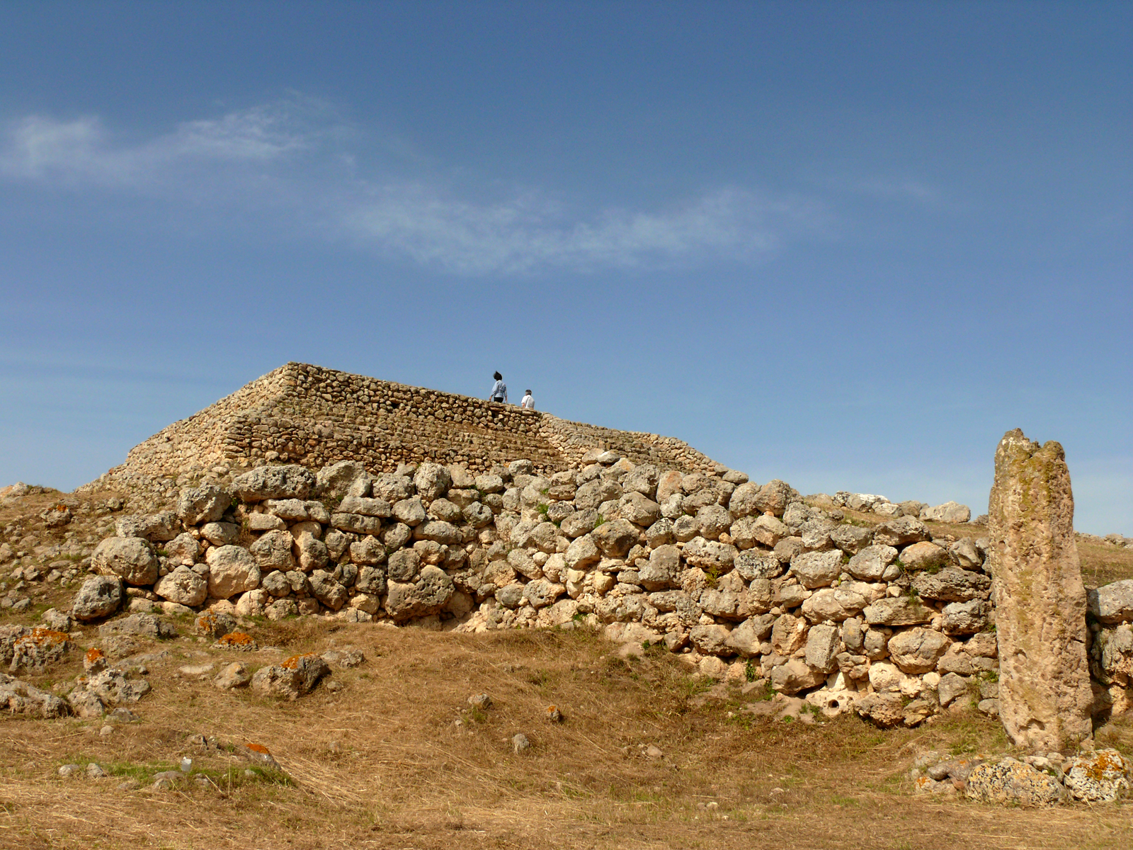 Altare prenuragico di Monte D' Accoddi (Sassari, Sardegna)